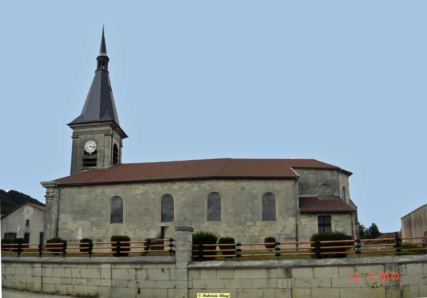 Eglise de Heudicourt sous les Cotes